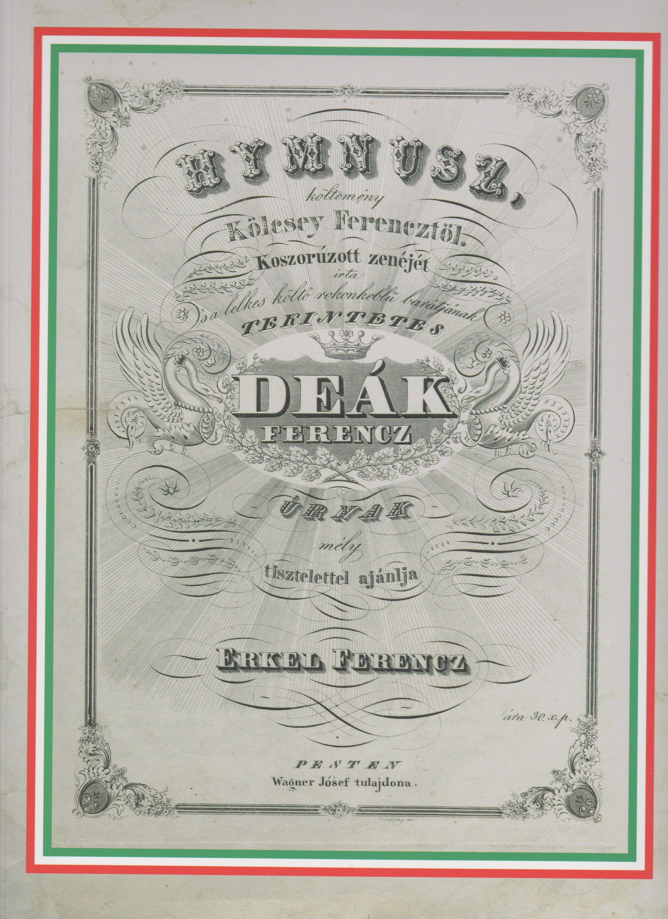 Magyar Himnusz című könyv főcímlapja, 1844